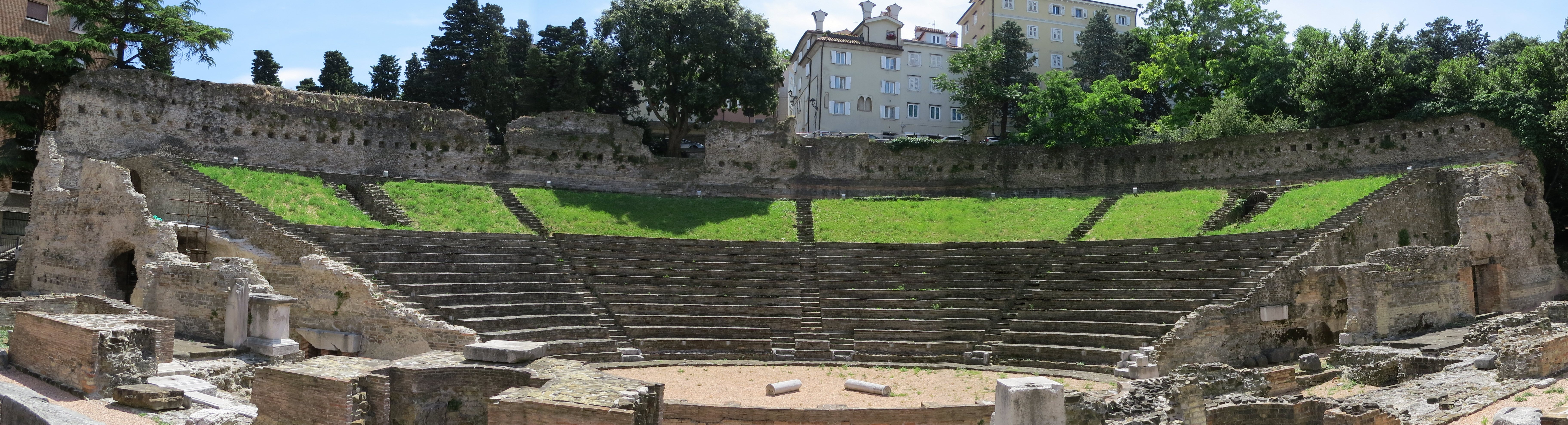 Rimsko gledališče v Trstu pod Gričem svetega Justa.